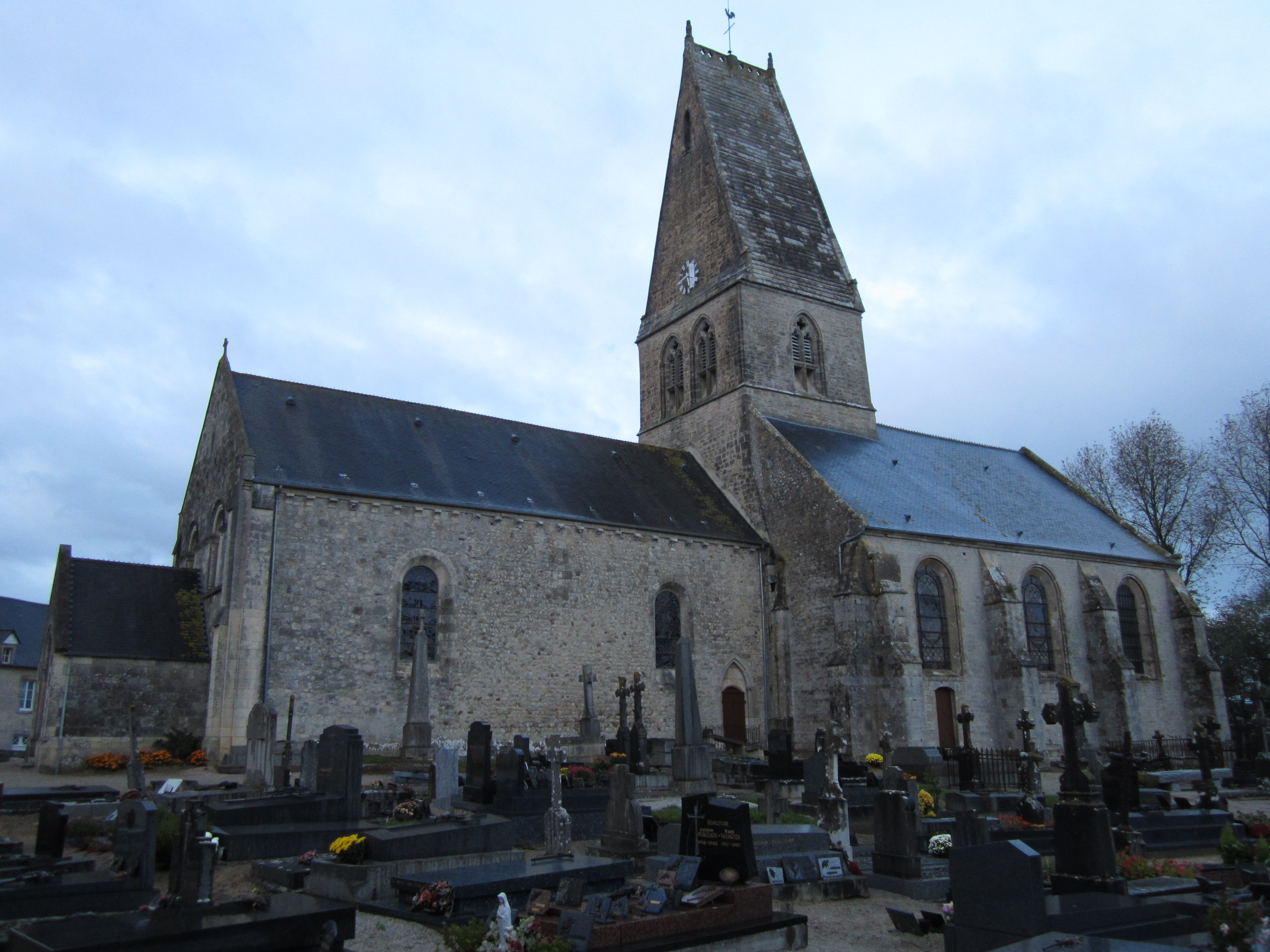 Église Saint-Martin de Fresville